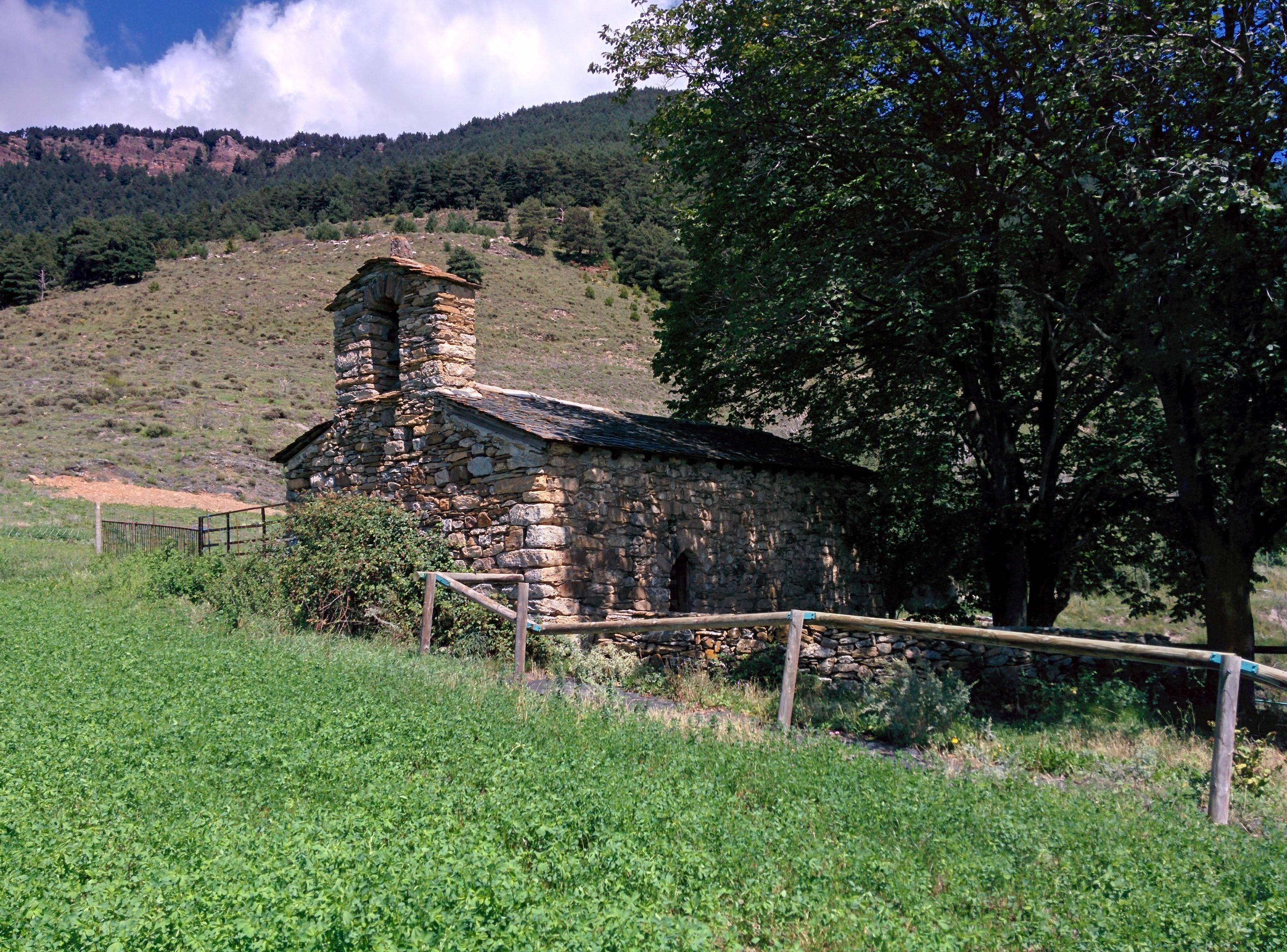 Al costat de la frontera d'Andorra amb la Vall de Valira